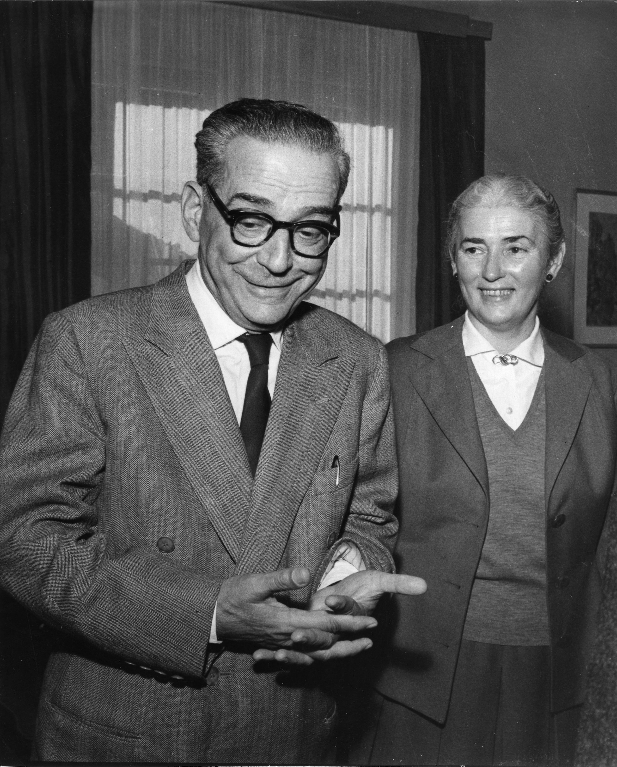 Ivo Andric, sa suprugom Milicom Babić, na vest o Nobelovoj nagradi 1961. Autor Stevan Kragujević (po odobrenju Tanje Kragujević)